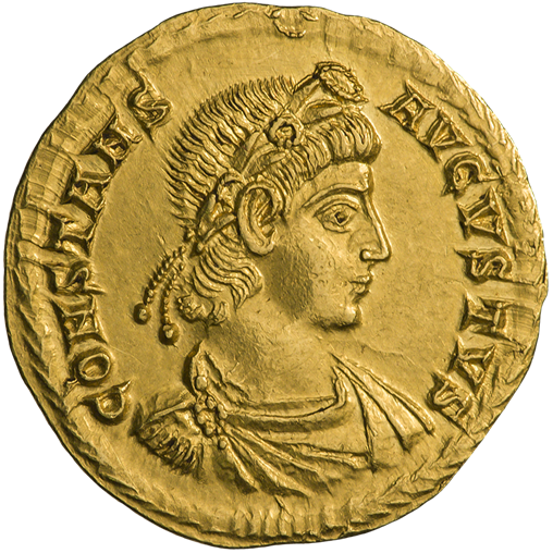 Солид. Констант I. Ок. 340—350 гг. (аверс). Бюст Константа I в плаще, вправо; на голове диадема из розеток.